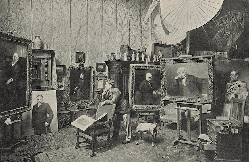 Das Atelier des Malers Max Koner, c. 1897